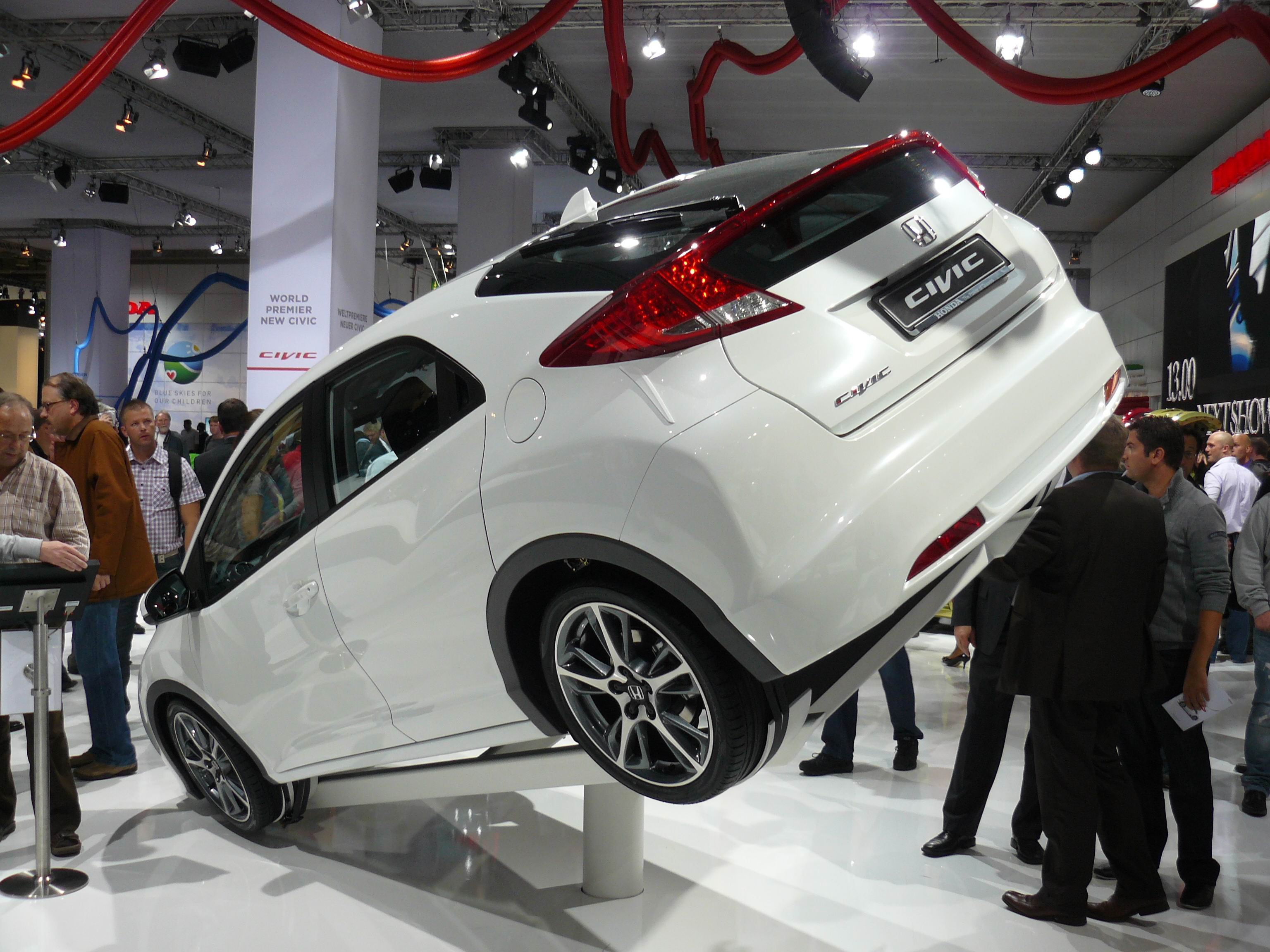 Salon de Francfort 2011